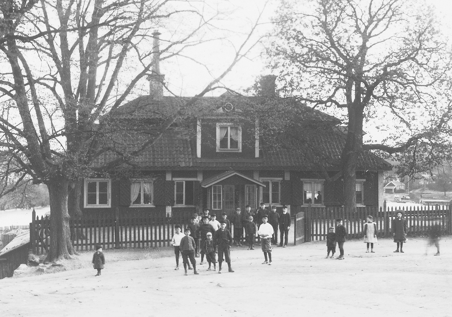 Jakobsbergs malmgård vid Hornstull (nu på Skansen)